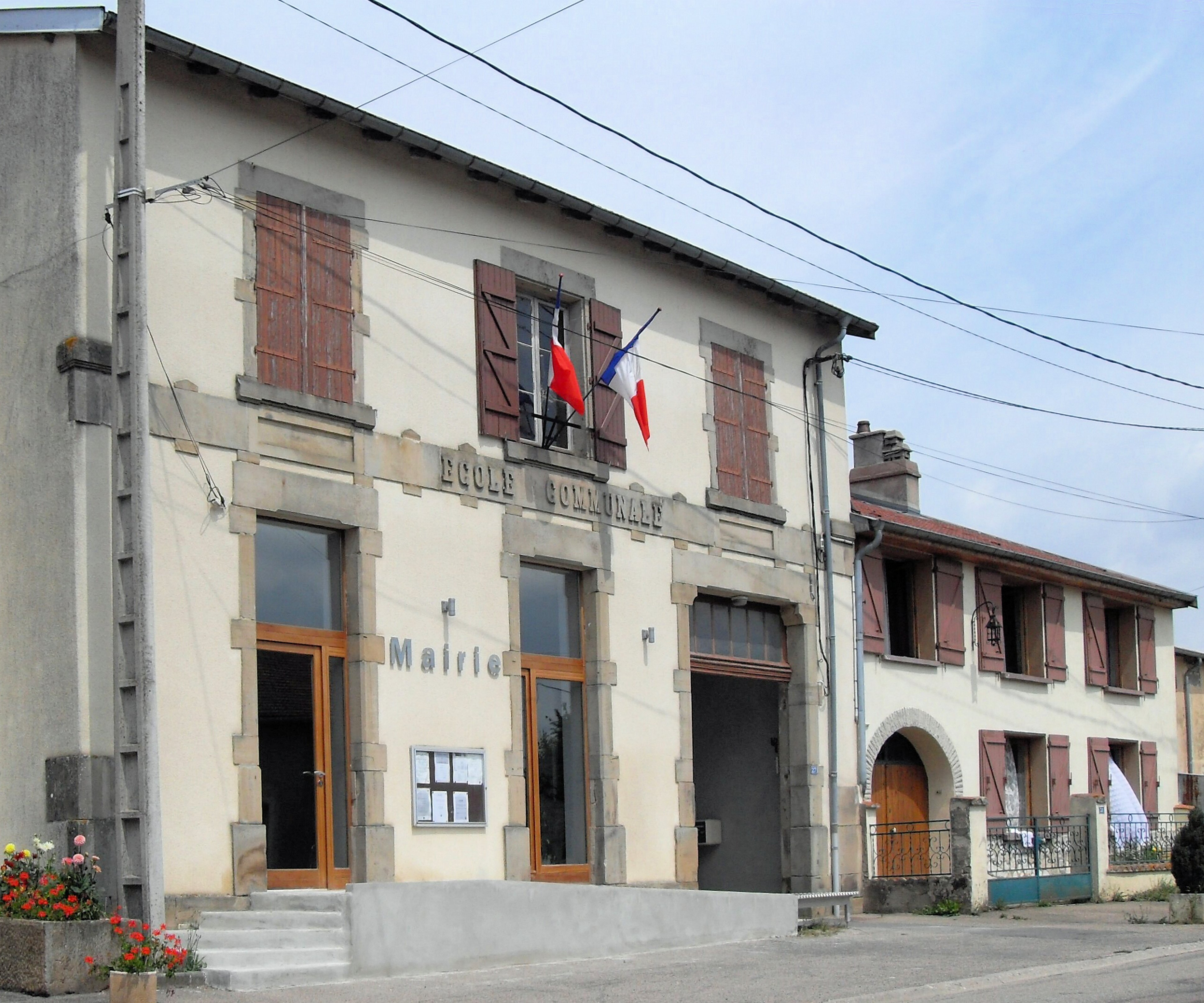 La mairie de Frenelle-la-Petite, l'ancienne école communale